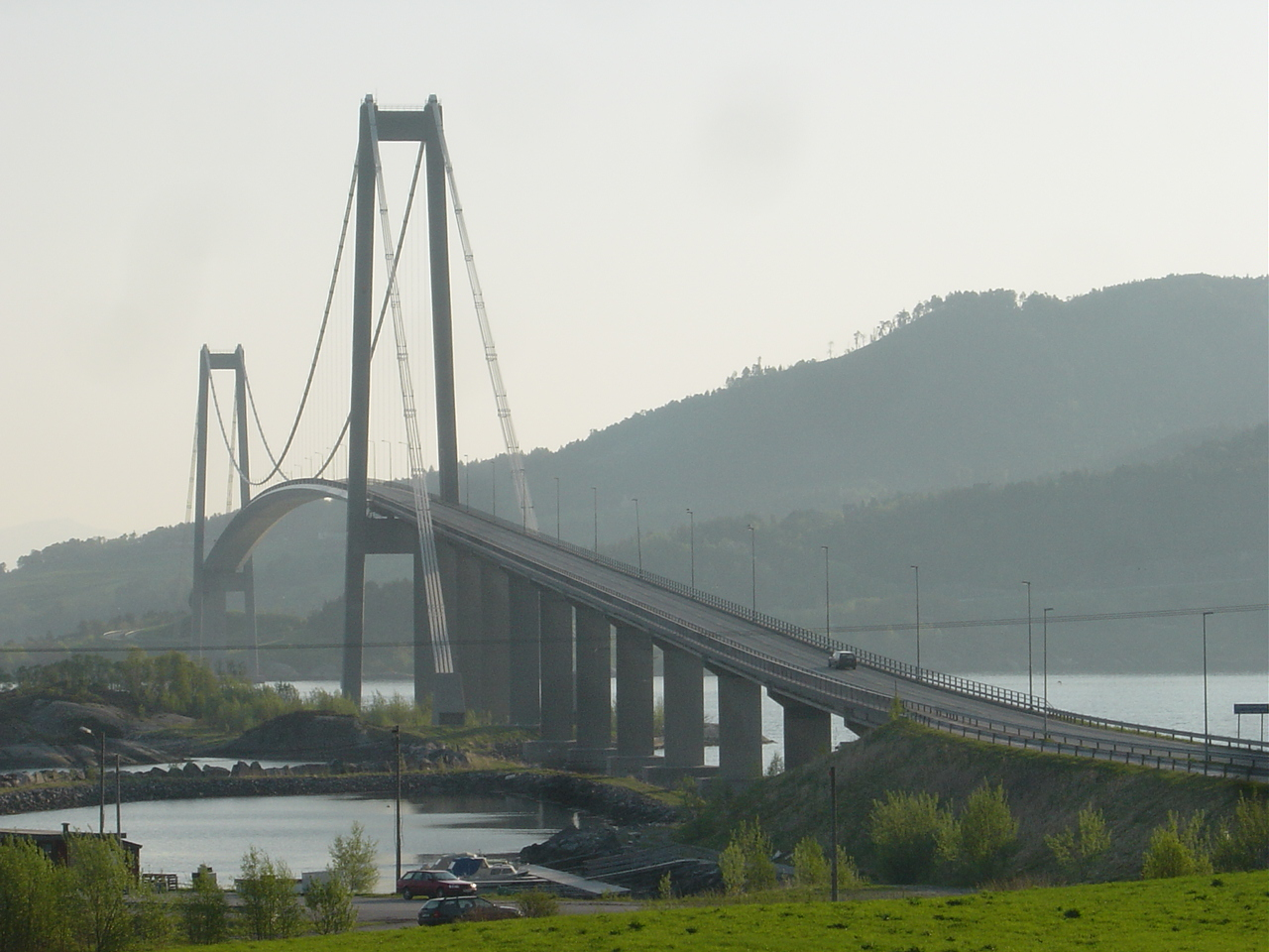 Gjemnessundbrua, Norway